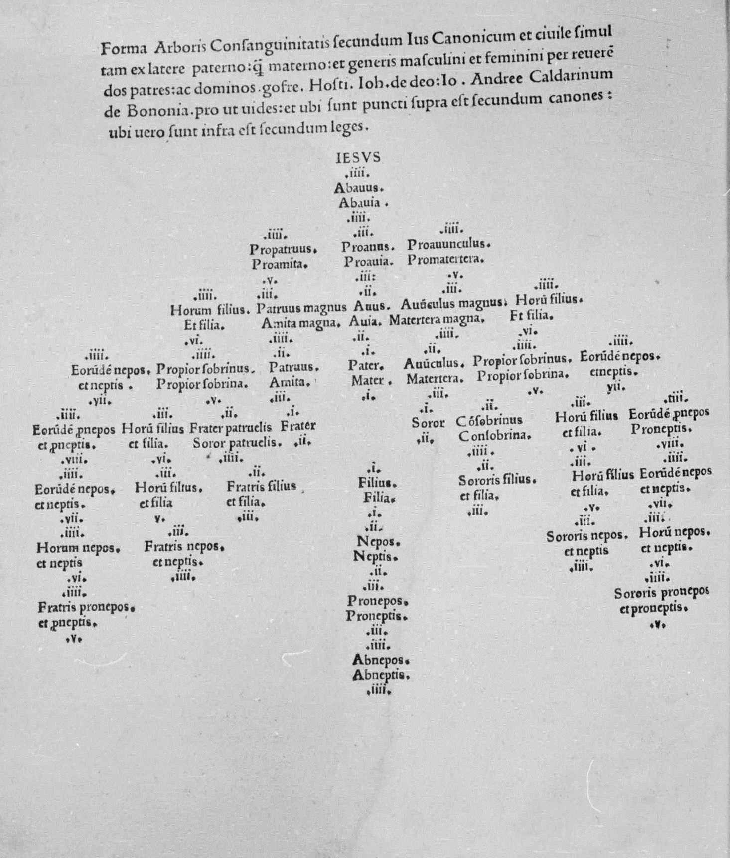 Carta a1v